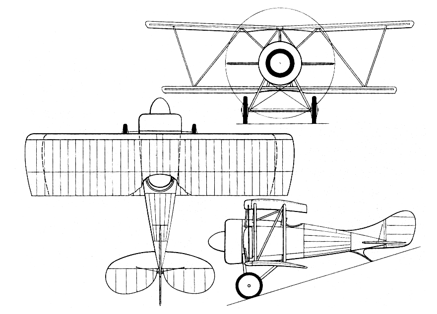 Tres vistas de Adamoli-Cattani